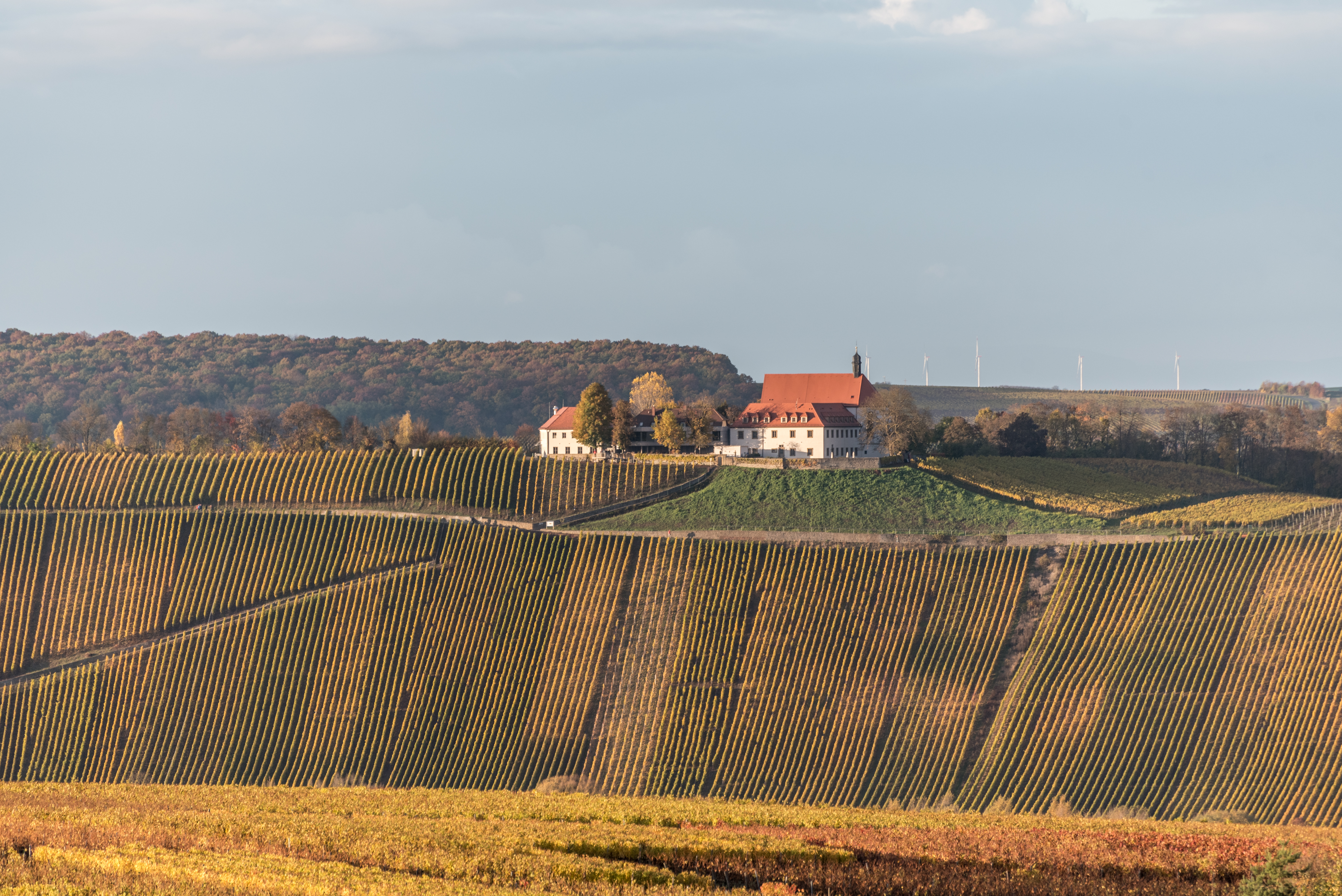 Volkach, Escherndorf, Vogelsburg 1